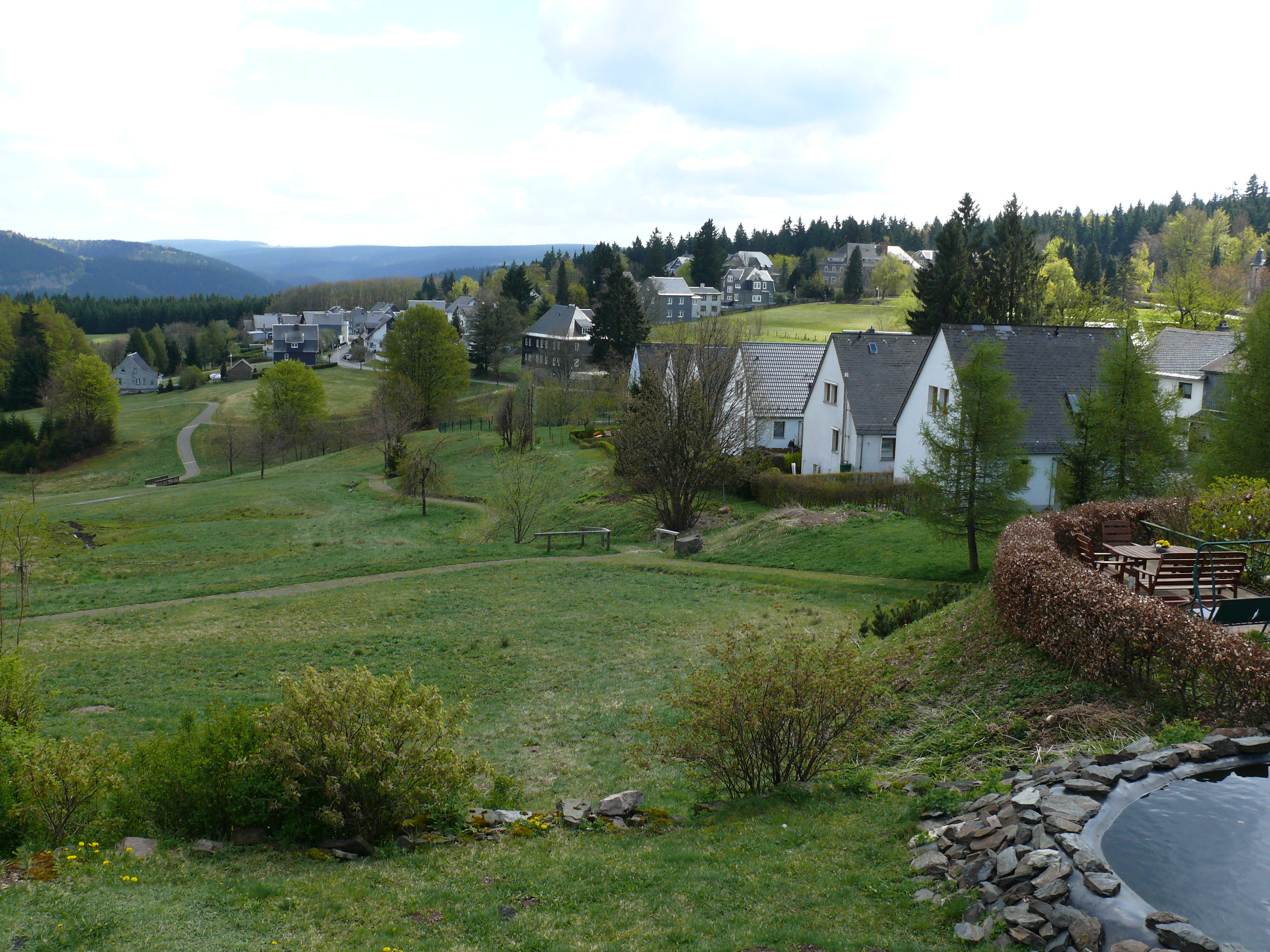 Ortsbild in Masserberg (Thüringen)